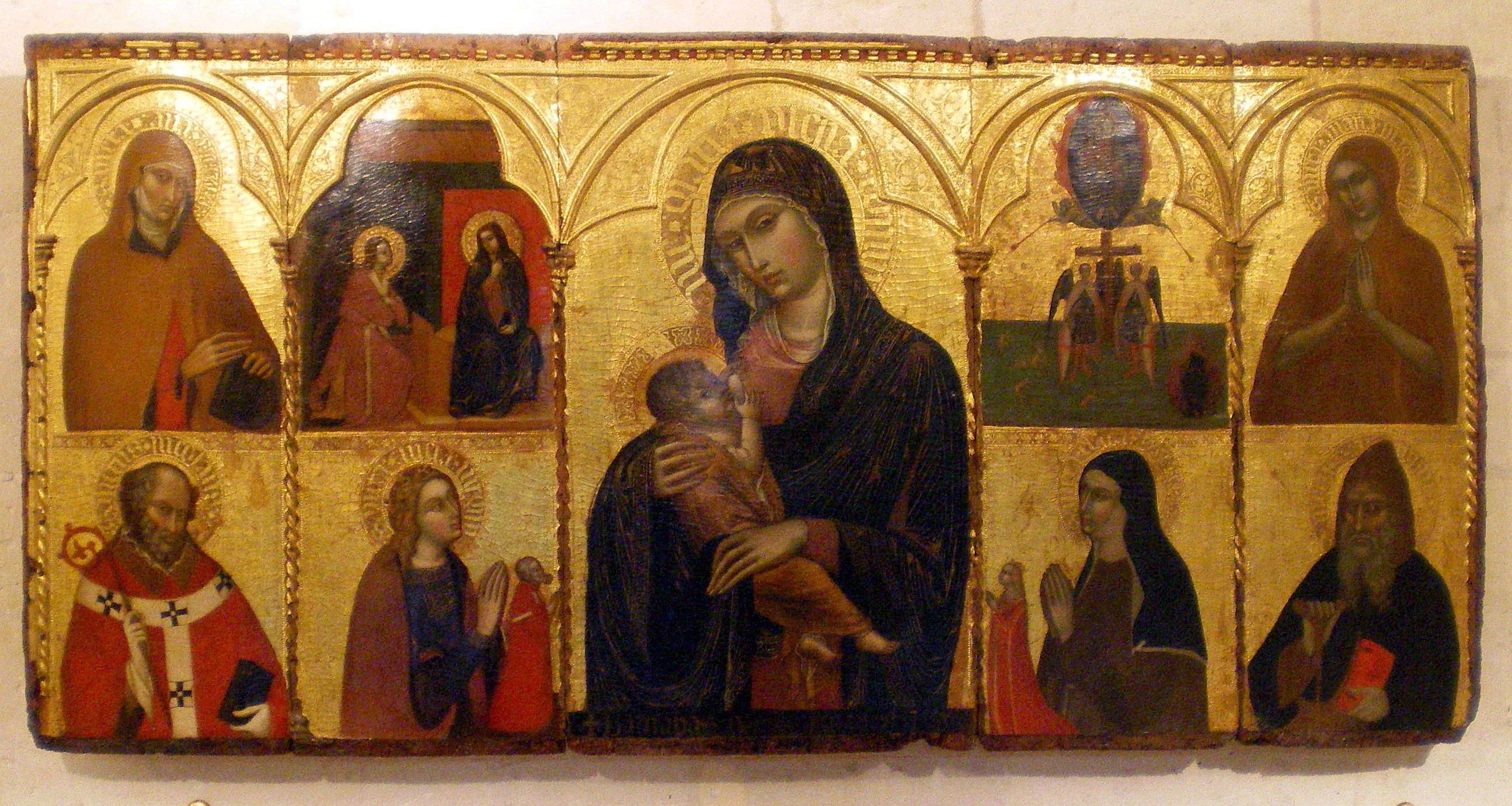 La obra representa a la Virgen de la Leche, y se supone que uno de los donantes que aparecen arrodillados en la parte inferior de la obra es el célebre magnate y escritor Don Juan Manuel (1282-1348), que fue nieto del rey Fernando III el Santo y adelantado mayor del reino de Murcia.